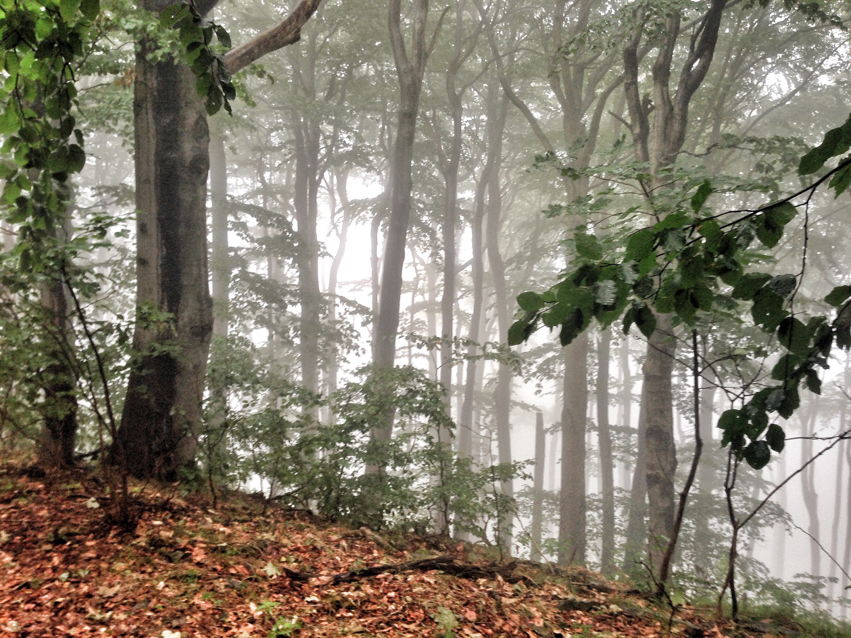 Hora Plešivec v Lužických horách u Krompachu, 658 m n. m.